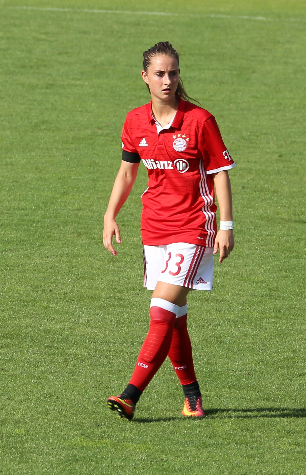 Sara Däbritz, FC Bayern München, beim Frauen-Bundesliga-Spiel FC Bayern München gegen SC Freiburg am 3. September 2016 im Stadion an der Grünwalder Straße (Ergebnis war 1:1).